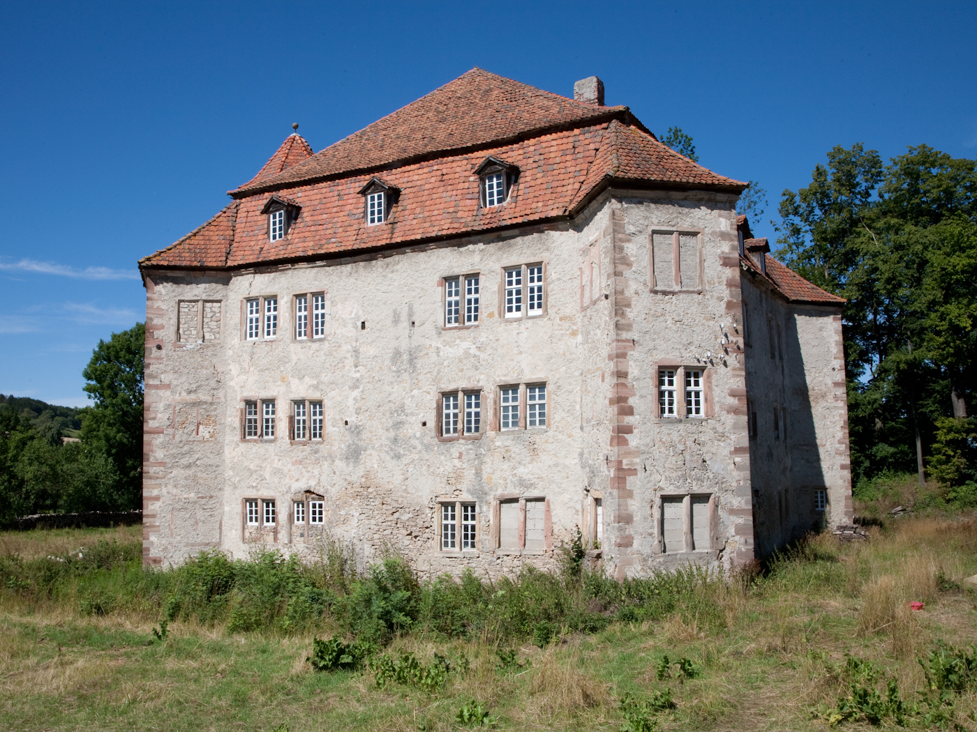 ehemaliges Wasserschloss in Netra